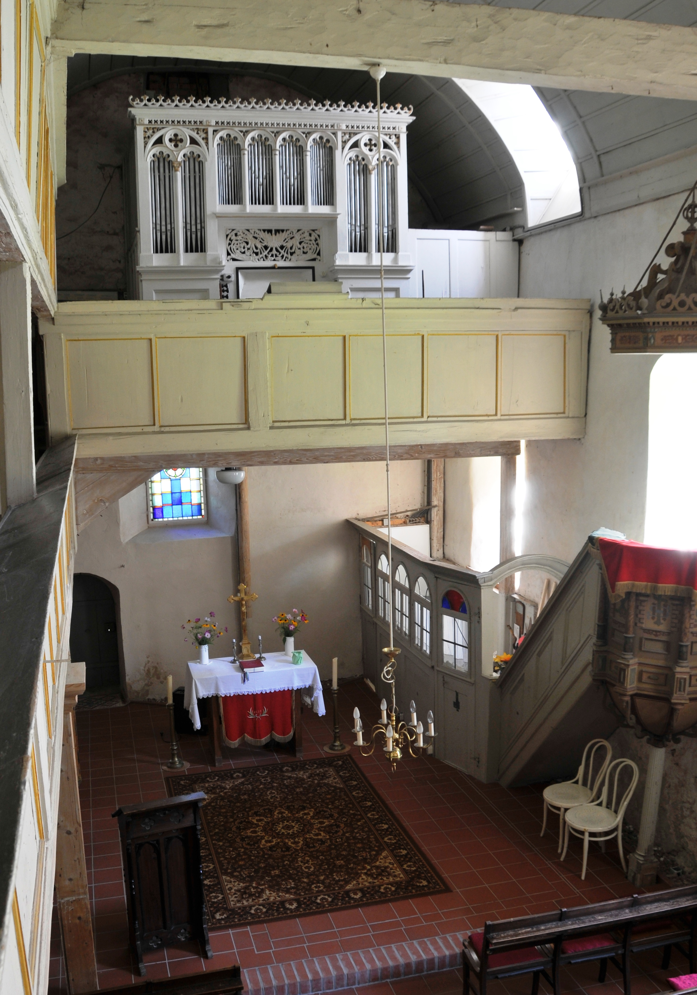 Cobstädt, Kirche